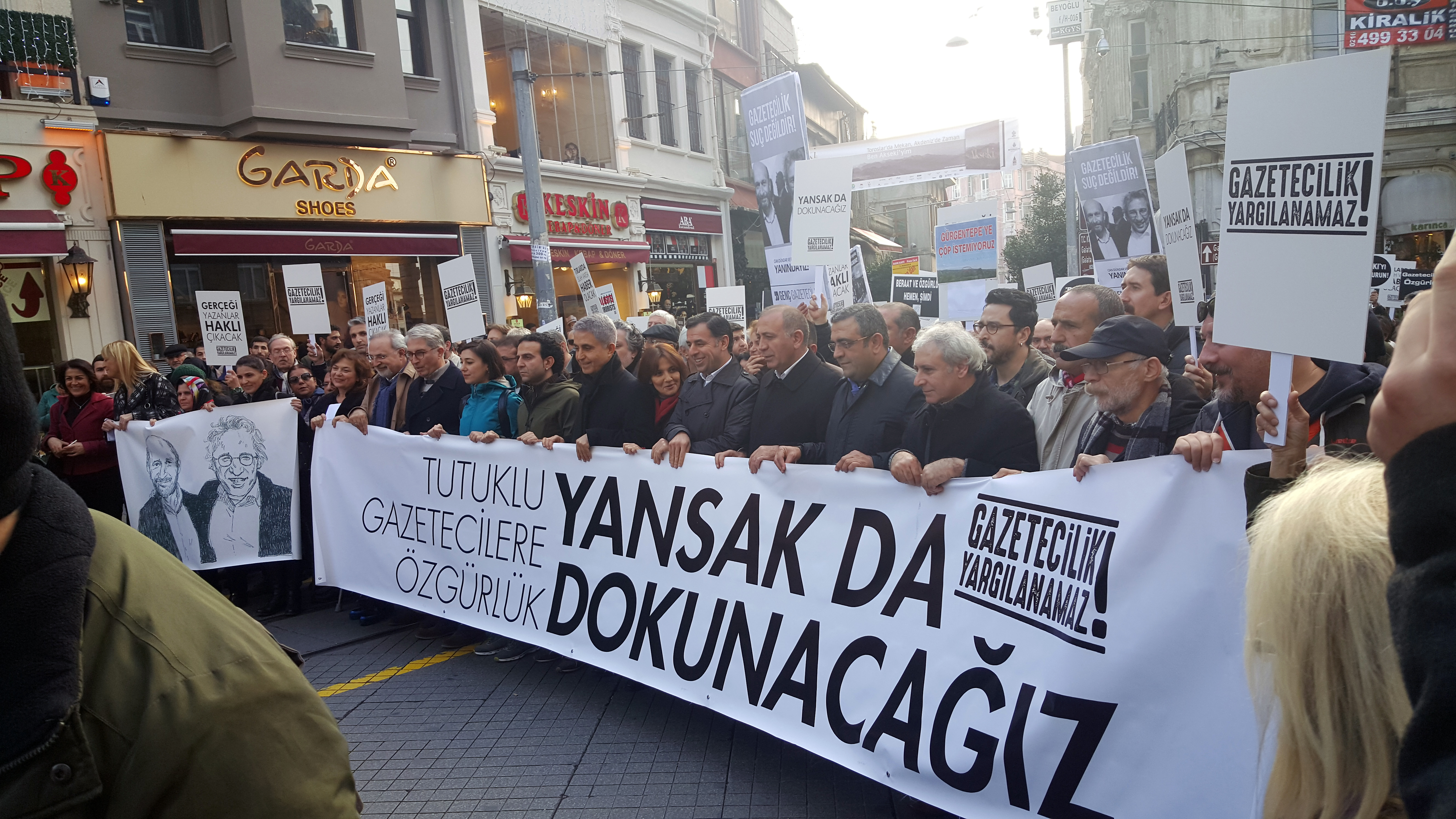 Can Dündar & Erdem Gül support